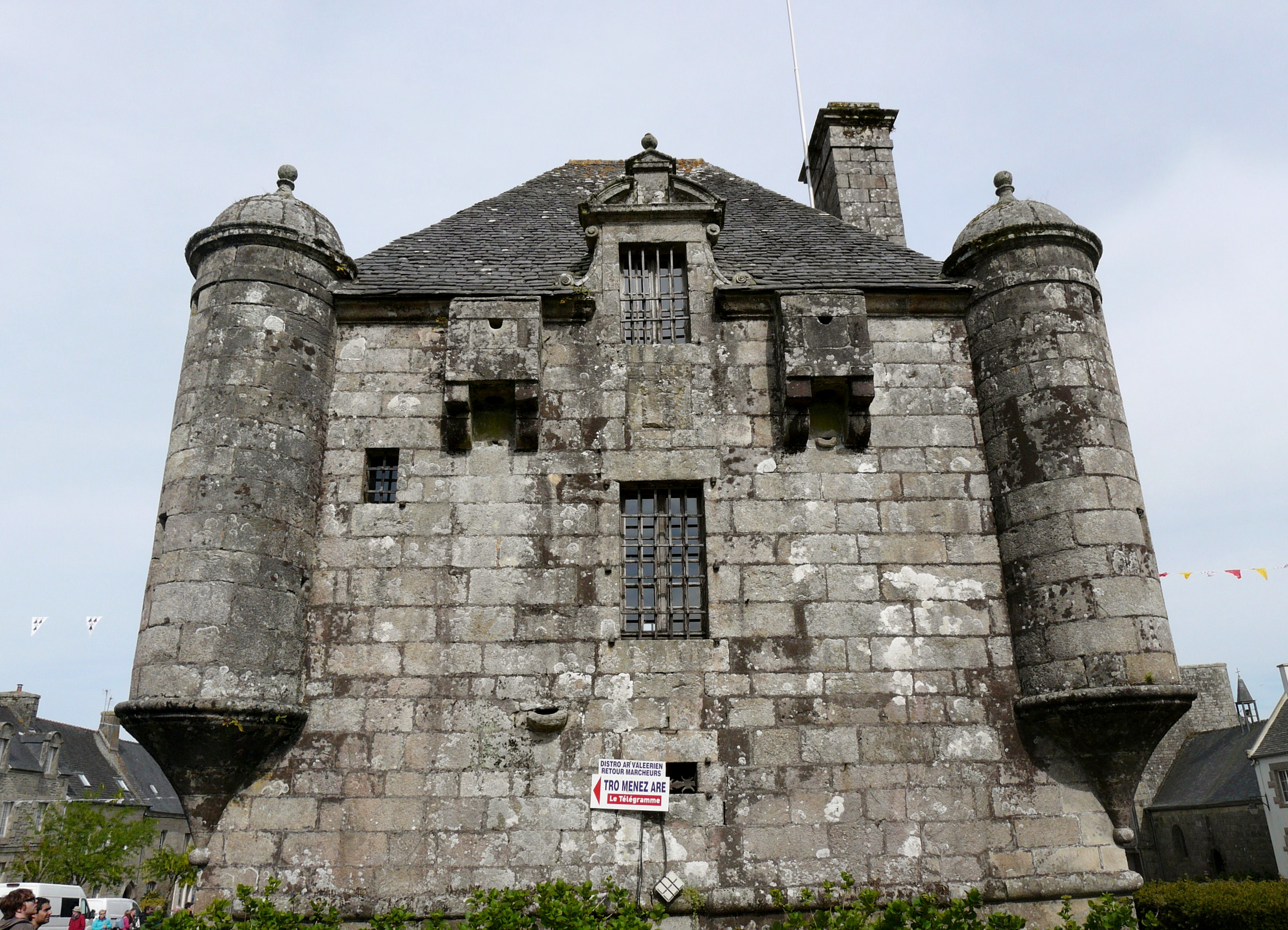 Pretorio di Guerlesquin